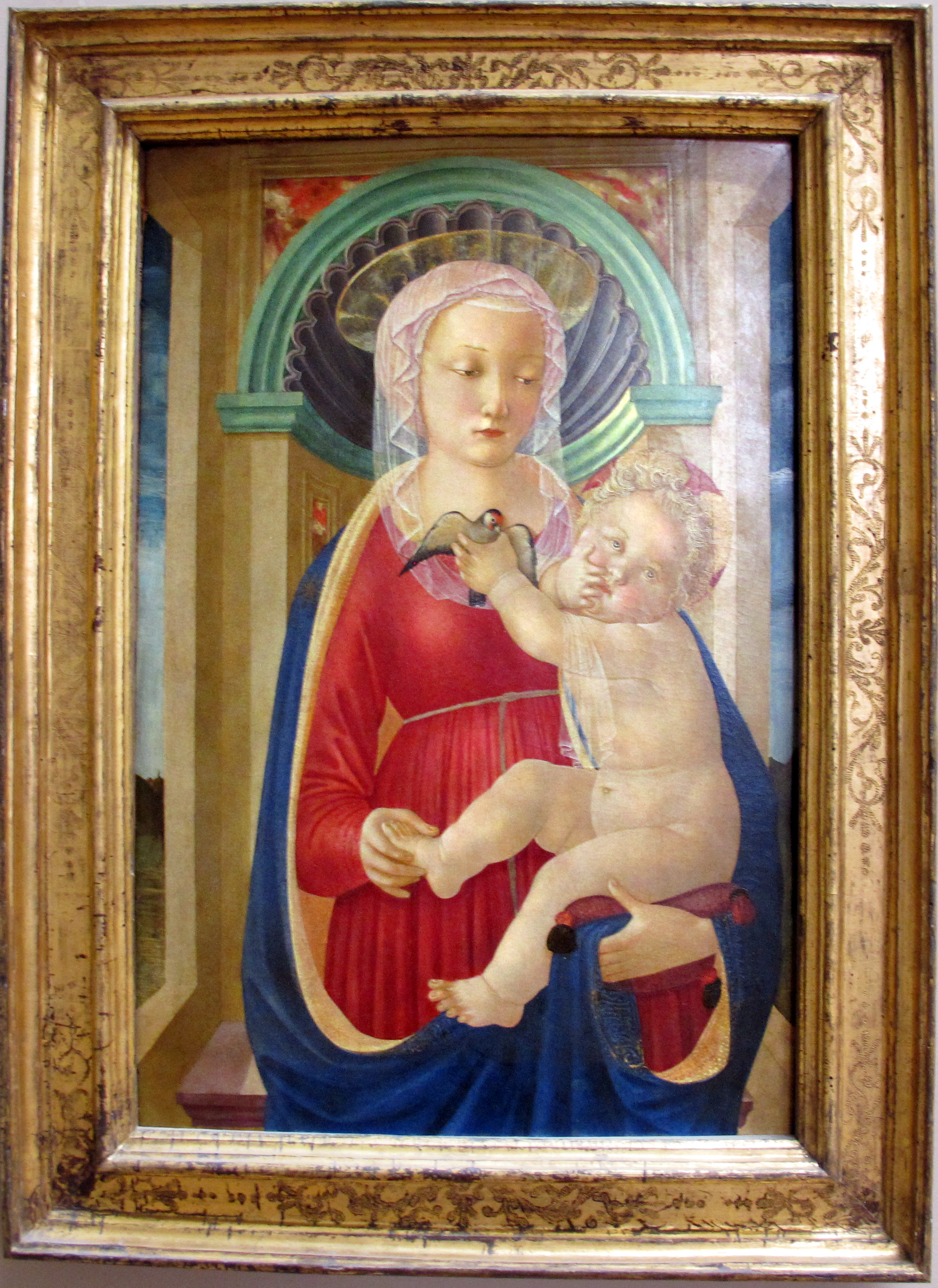 Pittura del Quattrocento italiano, Louvre